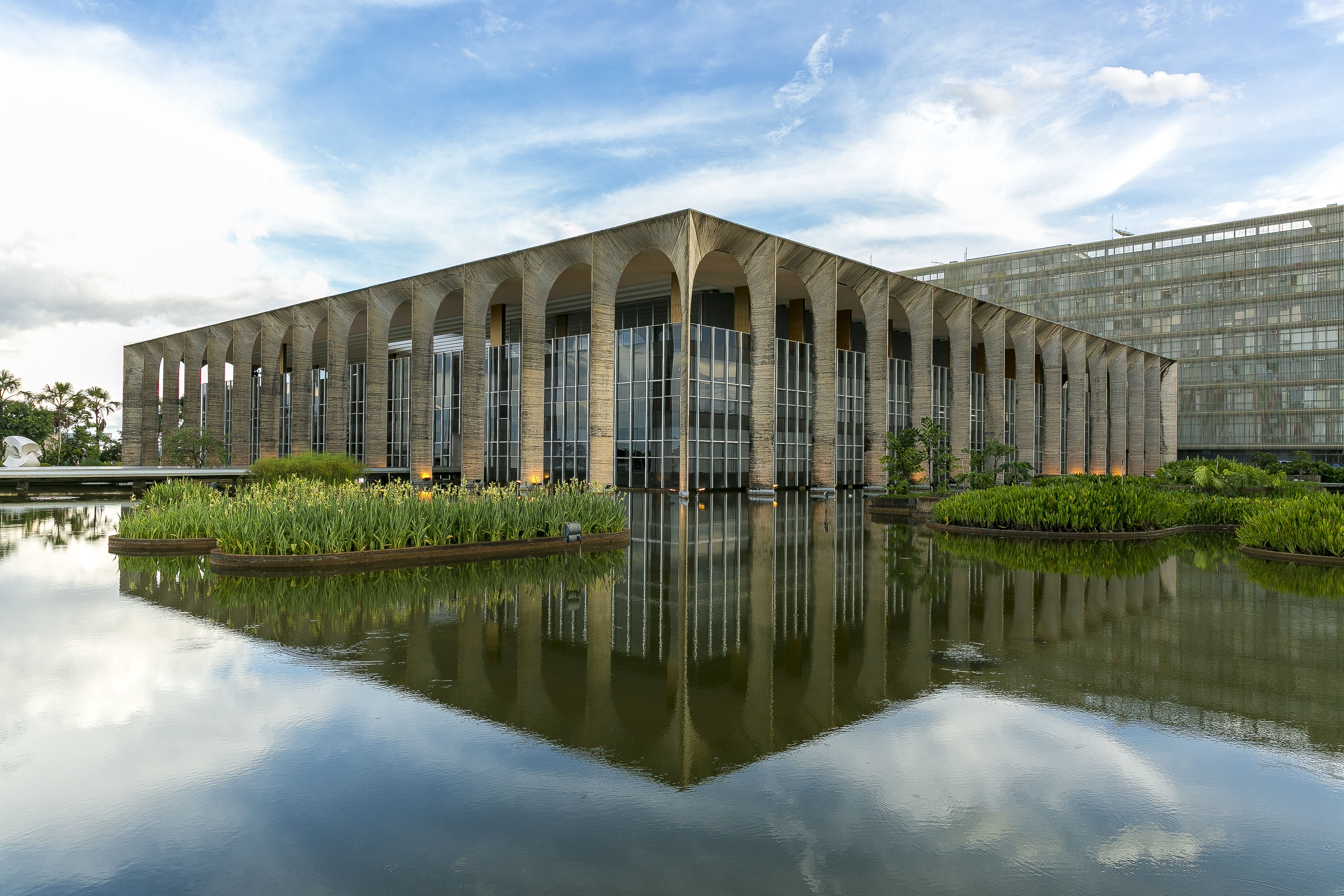 Palácio dos Arcos, mais conhecido como Palácio do Itamaraty, localizado na cidade de Brasília - DF - Brasil.